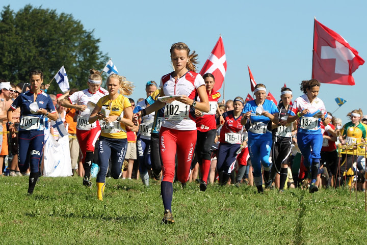 JWOC 2010, Aalborg Relay start